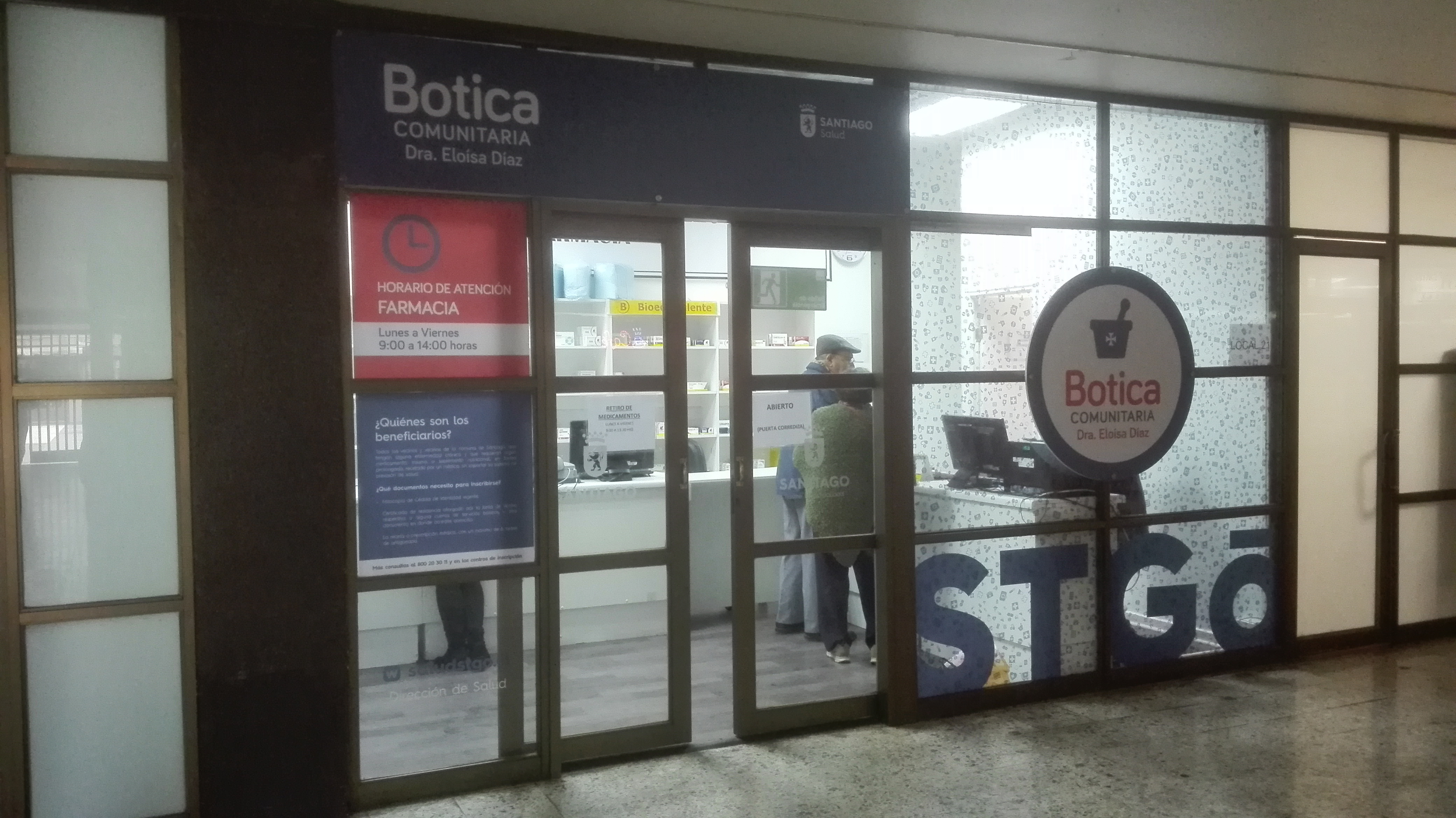 Farmacia municipal de Santiago, Galería Plazuela Santo Domingo.